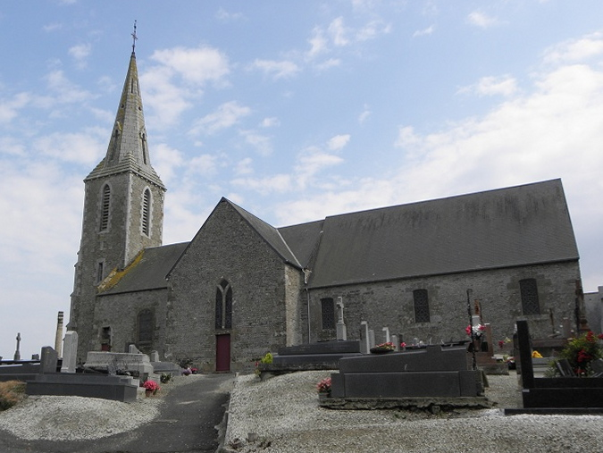 Église paroissiale d'Ardevon (50).